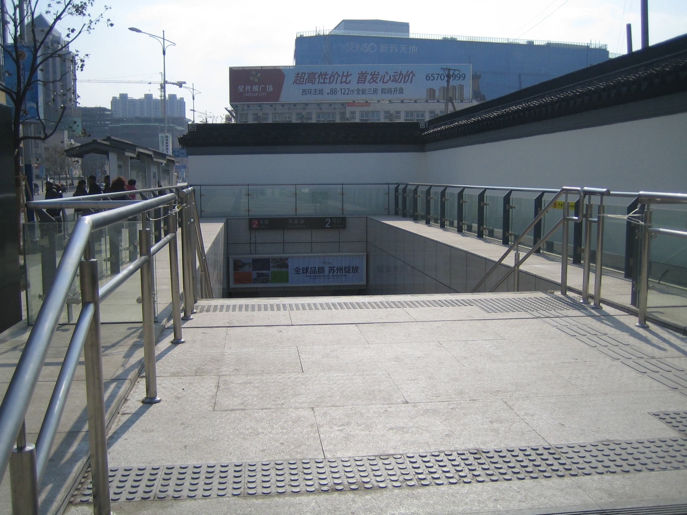 中文（中国大陆）: 苏州地铁2号线石路站2号口